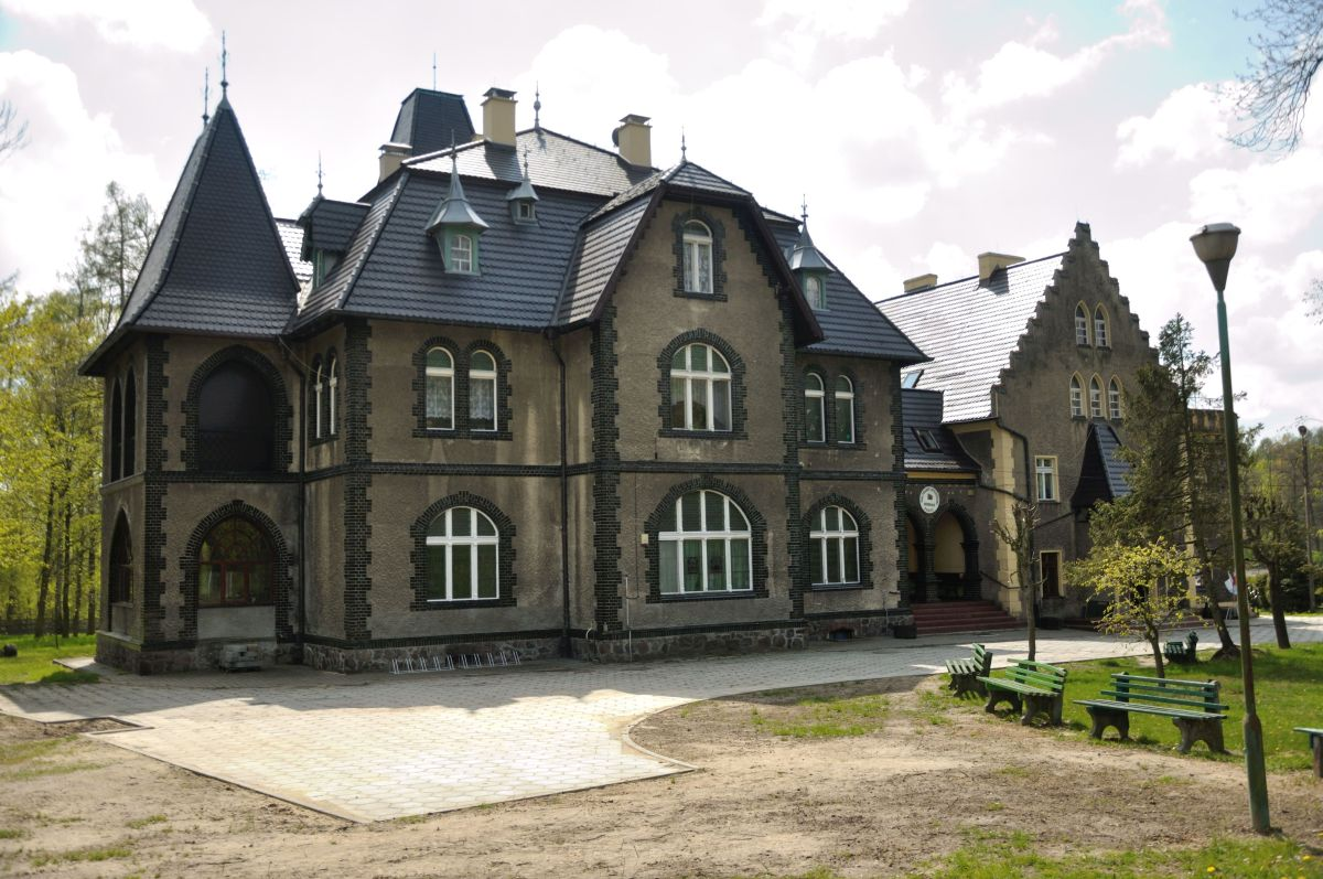 Chróścin Zamek - Pałac